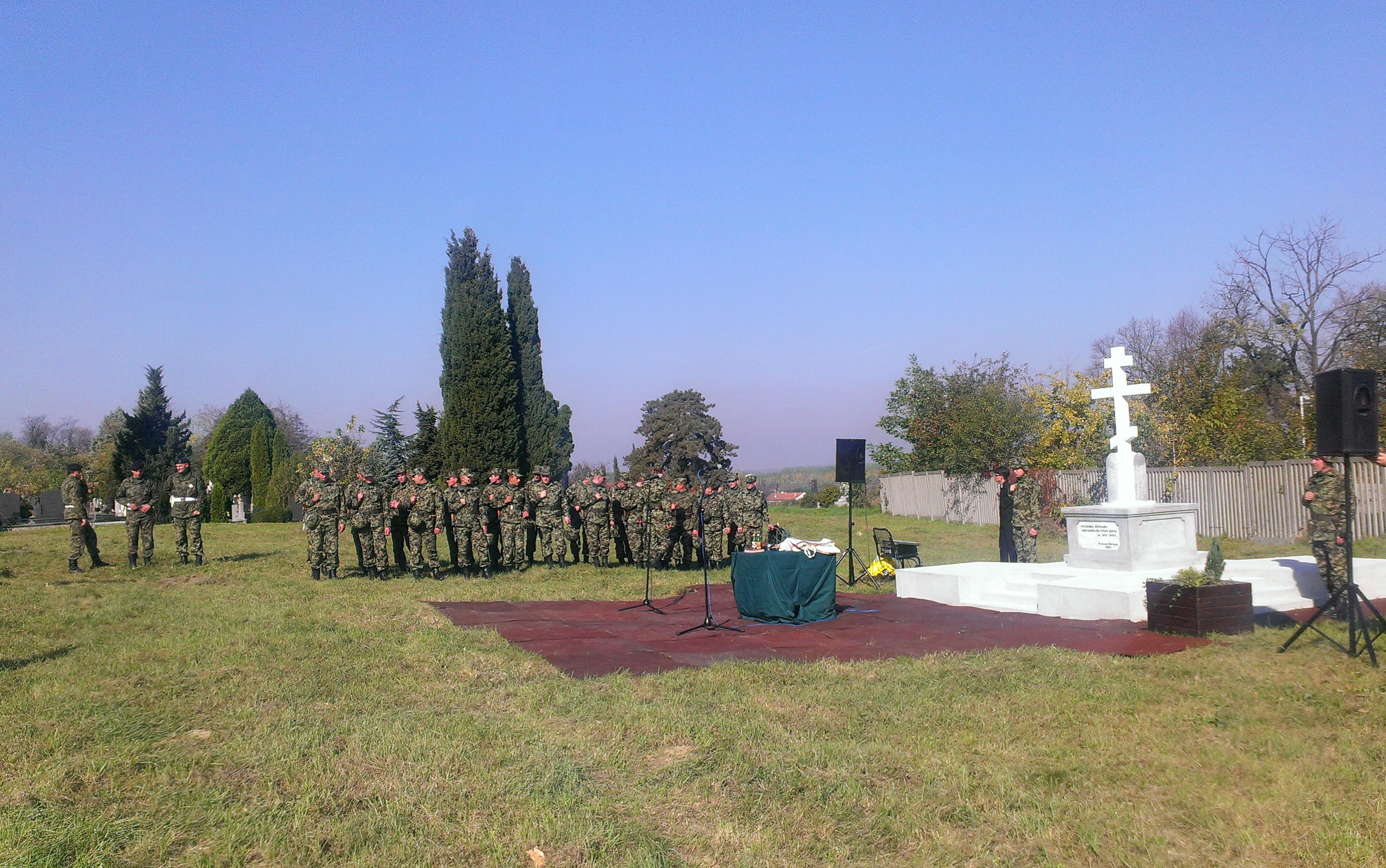 Споменик палим руским војницима 1915. - 1918.